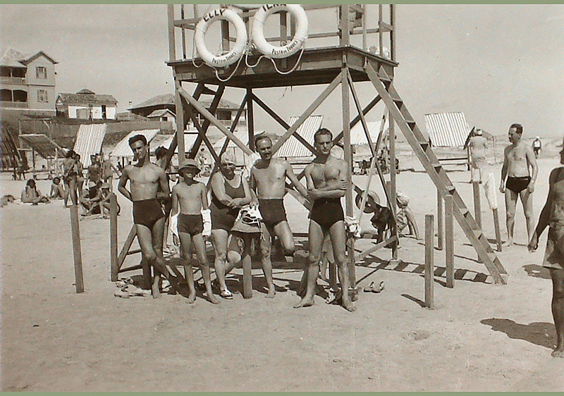 Família em Torres